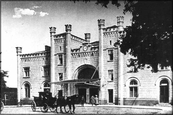 Polska, woj. wielkopolskie, Leszno, stary dworzec kolejowy w Lesznie po rozbudowie w 1909 r. Obecnie nieistniejący.